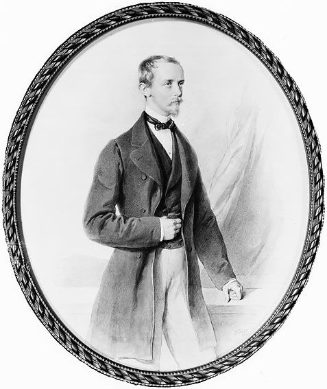 Karl Heinrich, 6. Fürst zu Löwenstein-Wertheim-Rochefort (1834-1921)